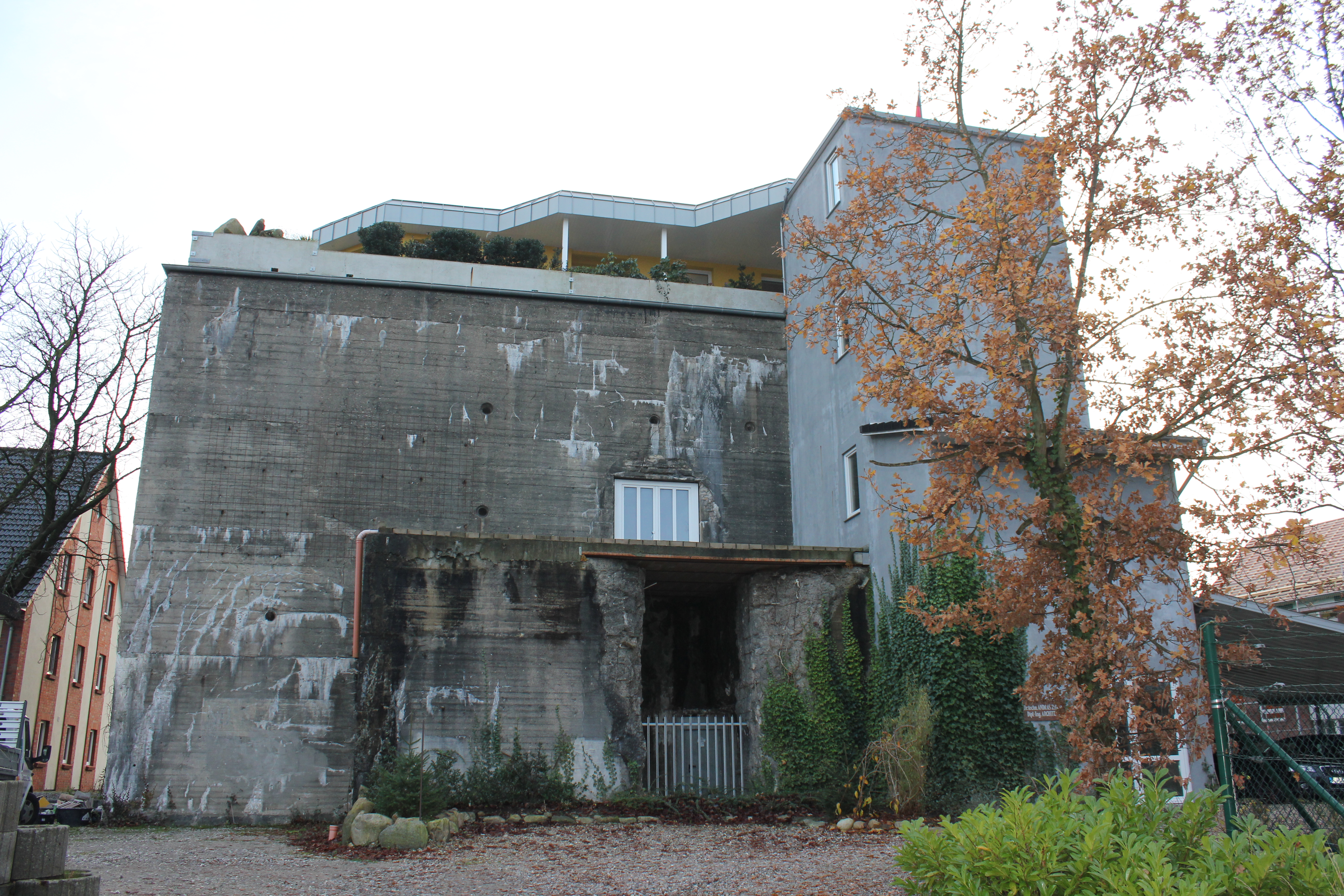 Mürwiker Truppenmannschaftsbunker (2013), Bild 07